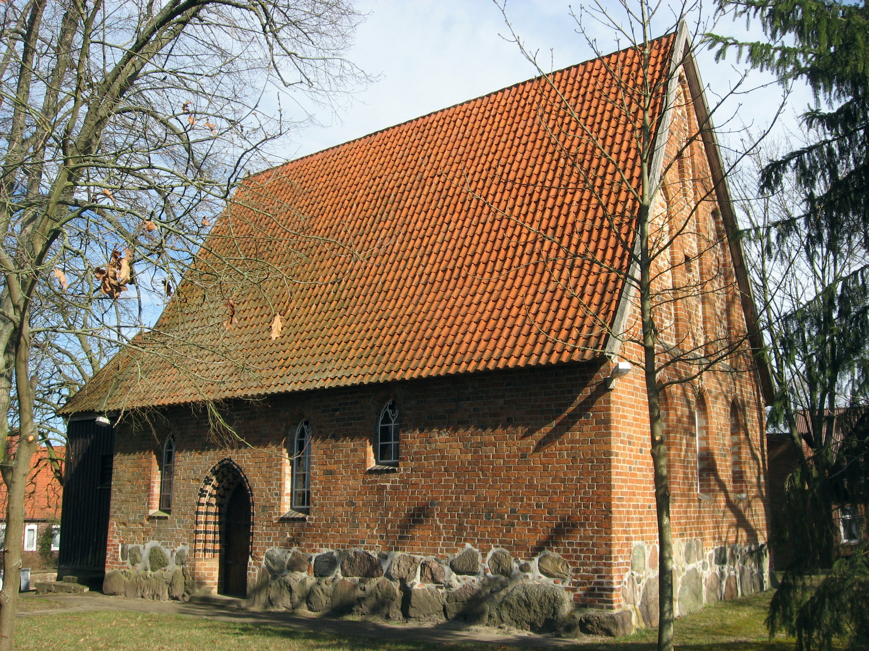 Evangelische Kapelle im Uelzener Ortsteil Hanstedt II